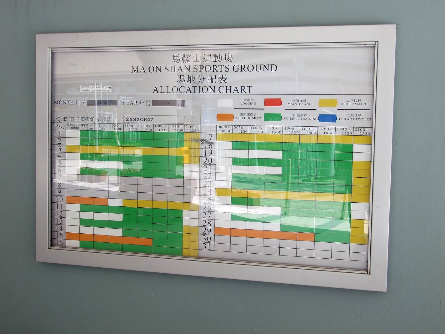 馬鞍山運動場場地分配表